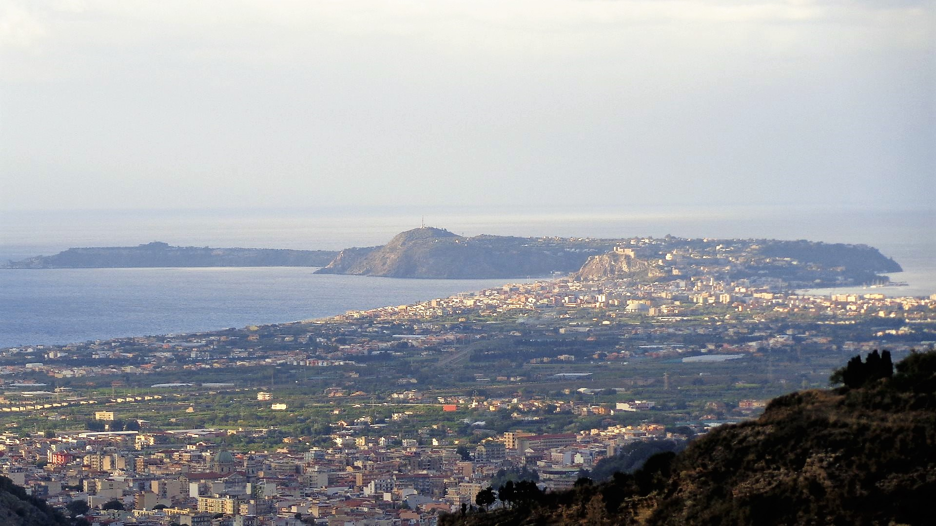 Panorama